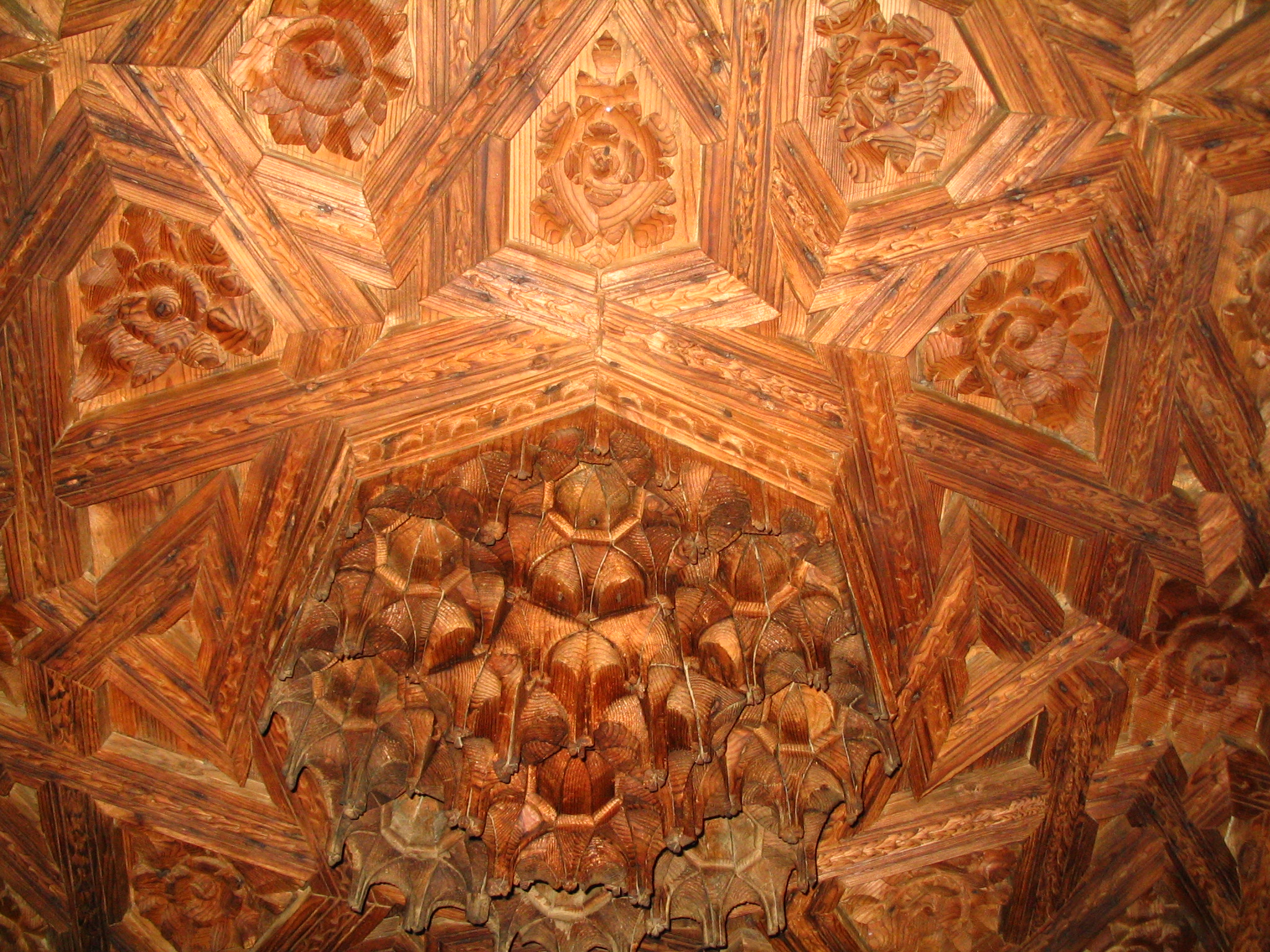 Mocárabe del alfarje del coro, Iglesia Parroquial Ntra Sra del Castillo, Macotera